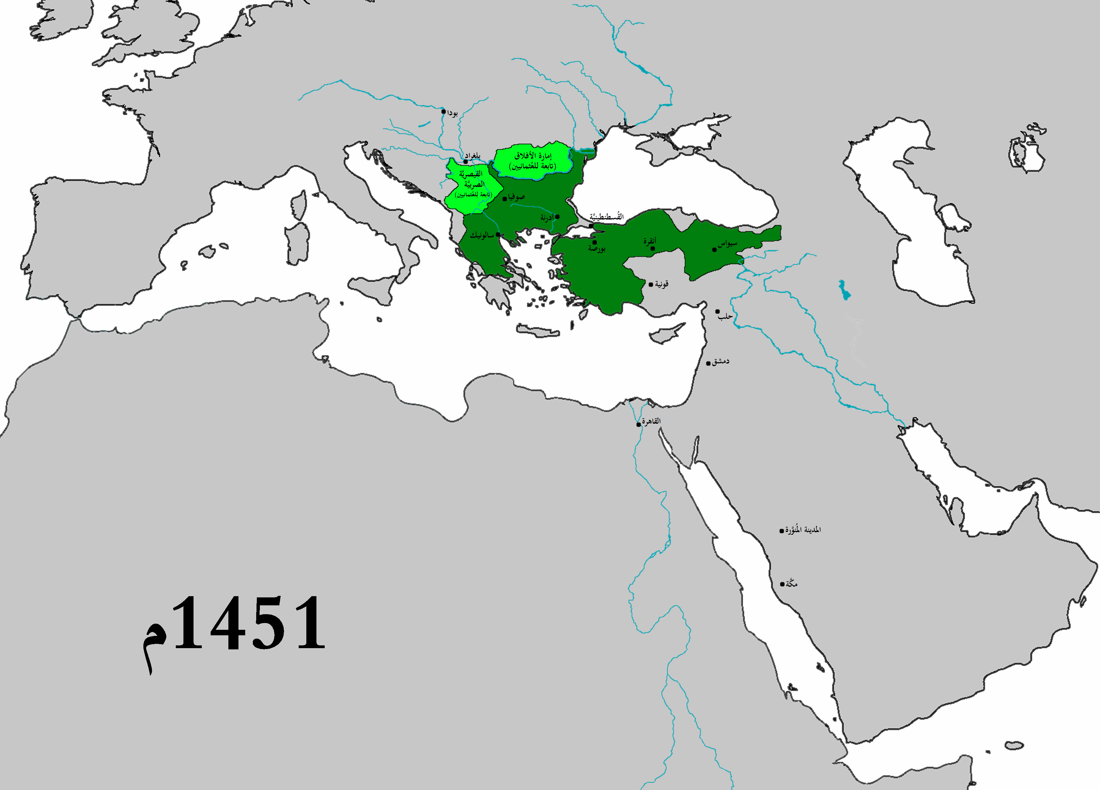 خريطة تُصوَّر حُدود الدولة العُثمانيَّة سنة 1451م، والدُول الخاضعة لها.